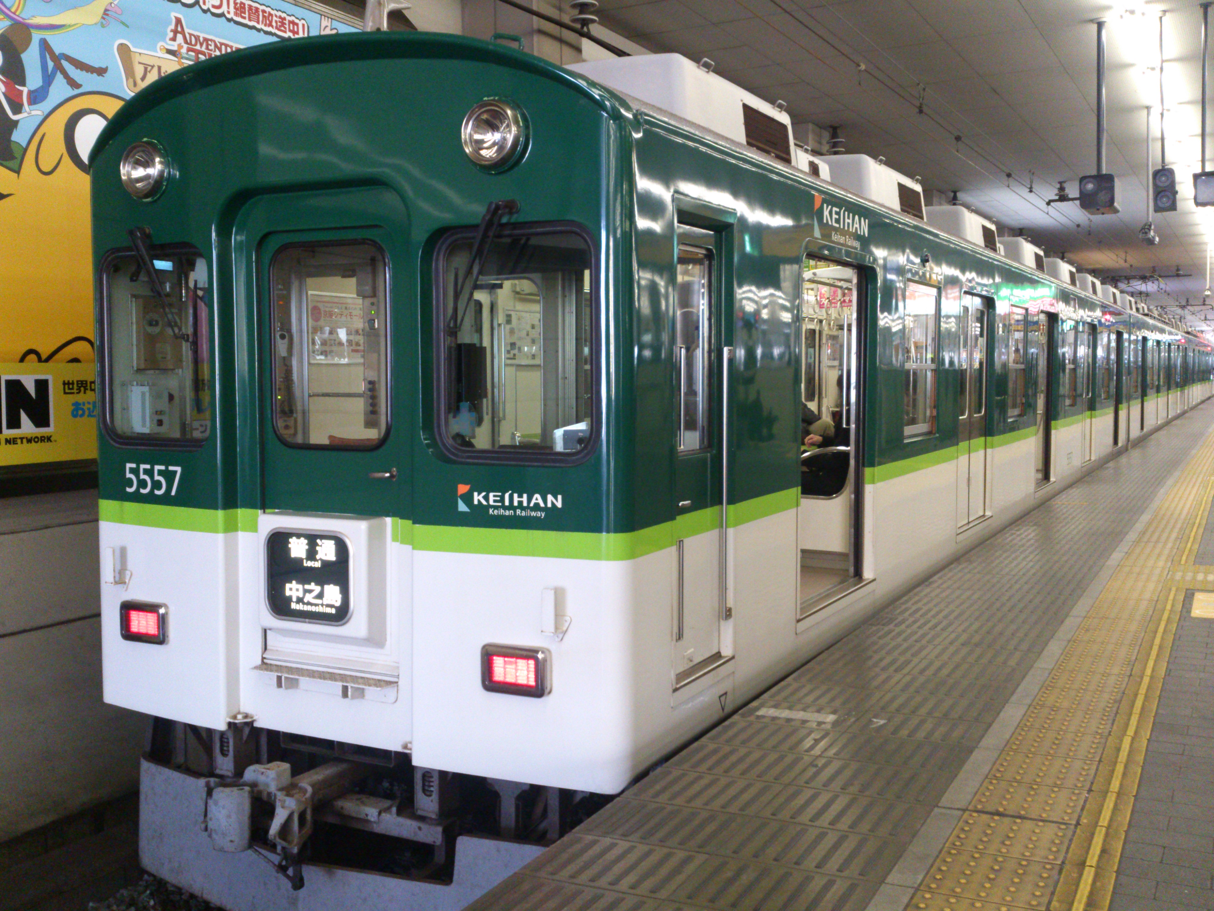 京橋駅にて撮影